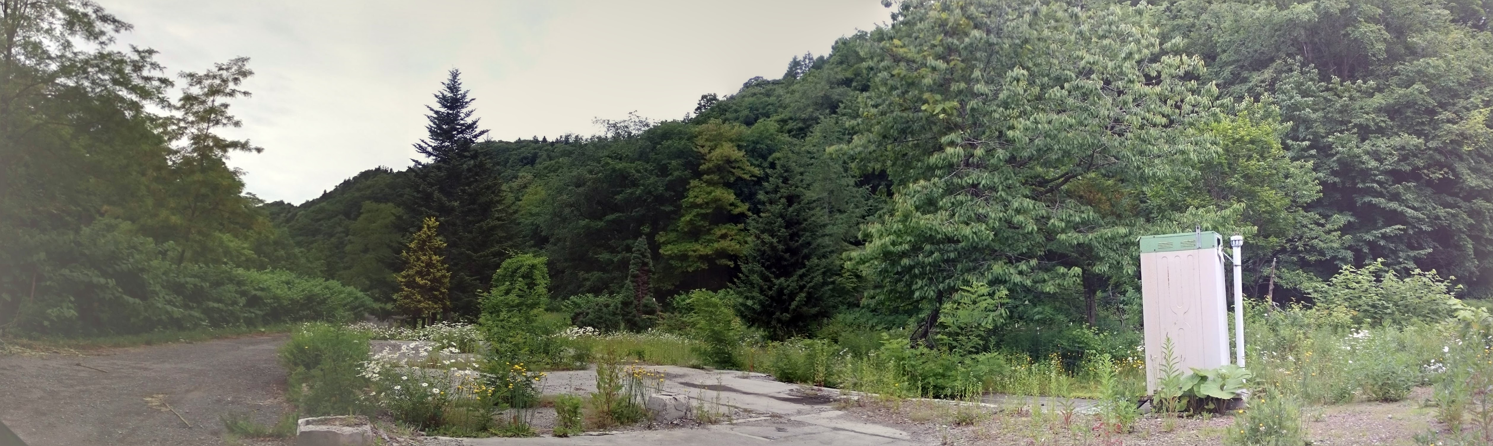 万字炭山駅跡地